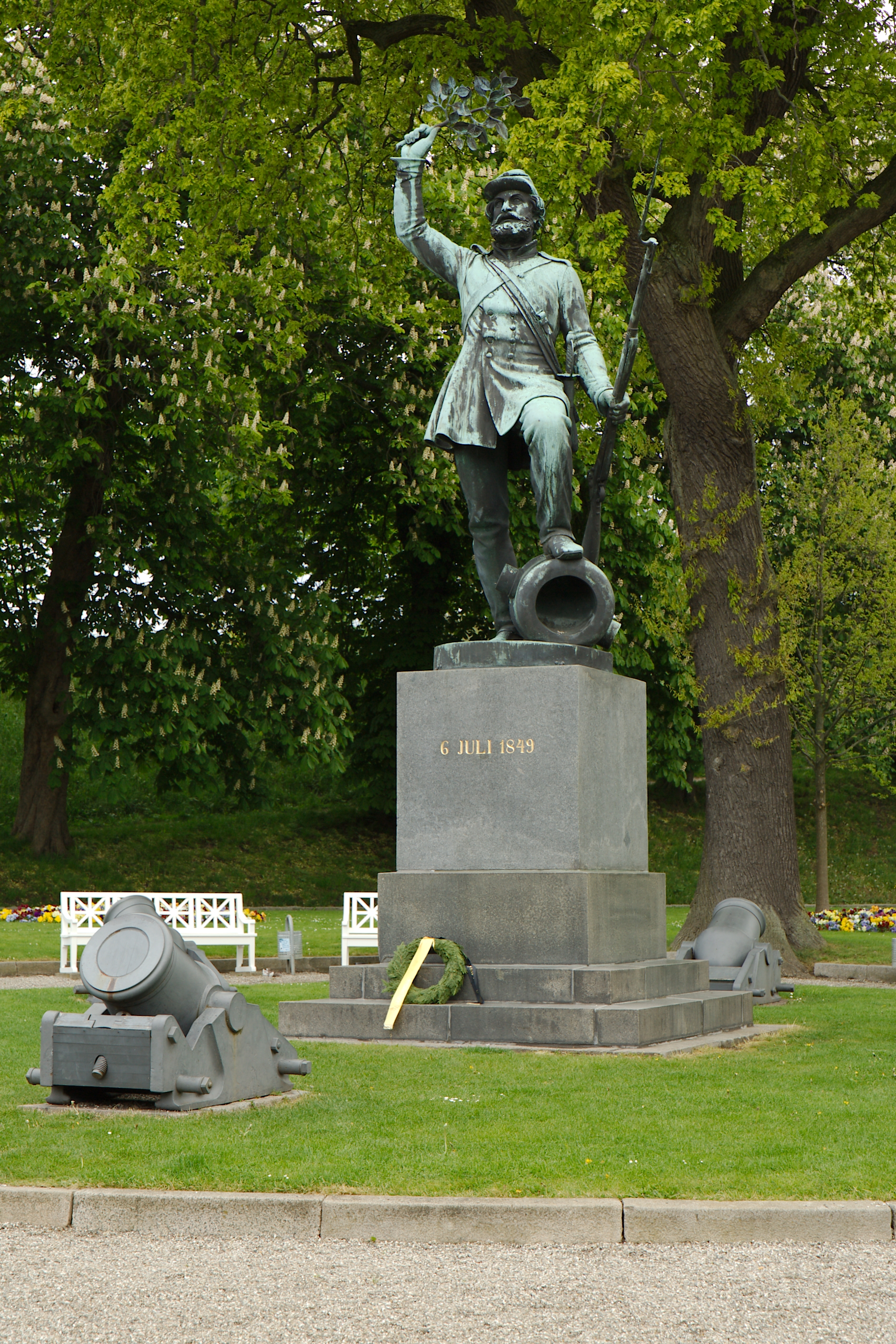 Landsoldaten